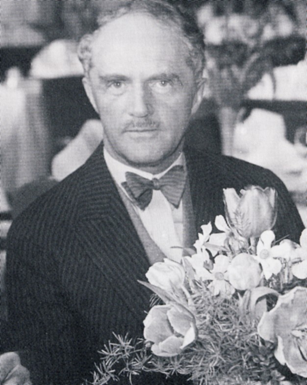 Ivar Tengbom (1878-1968), svenk arkitekt